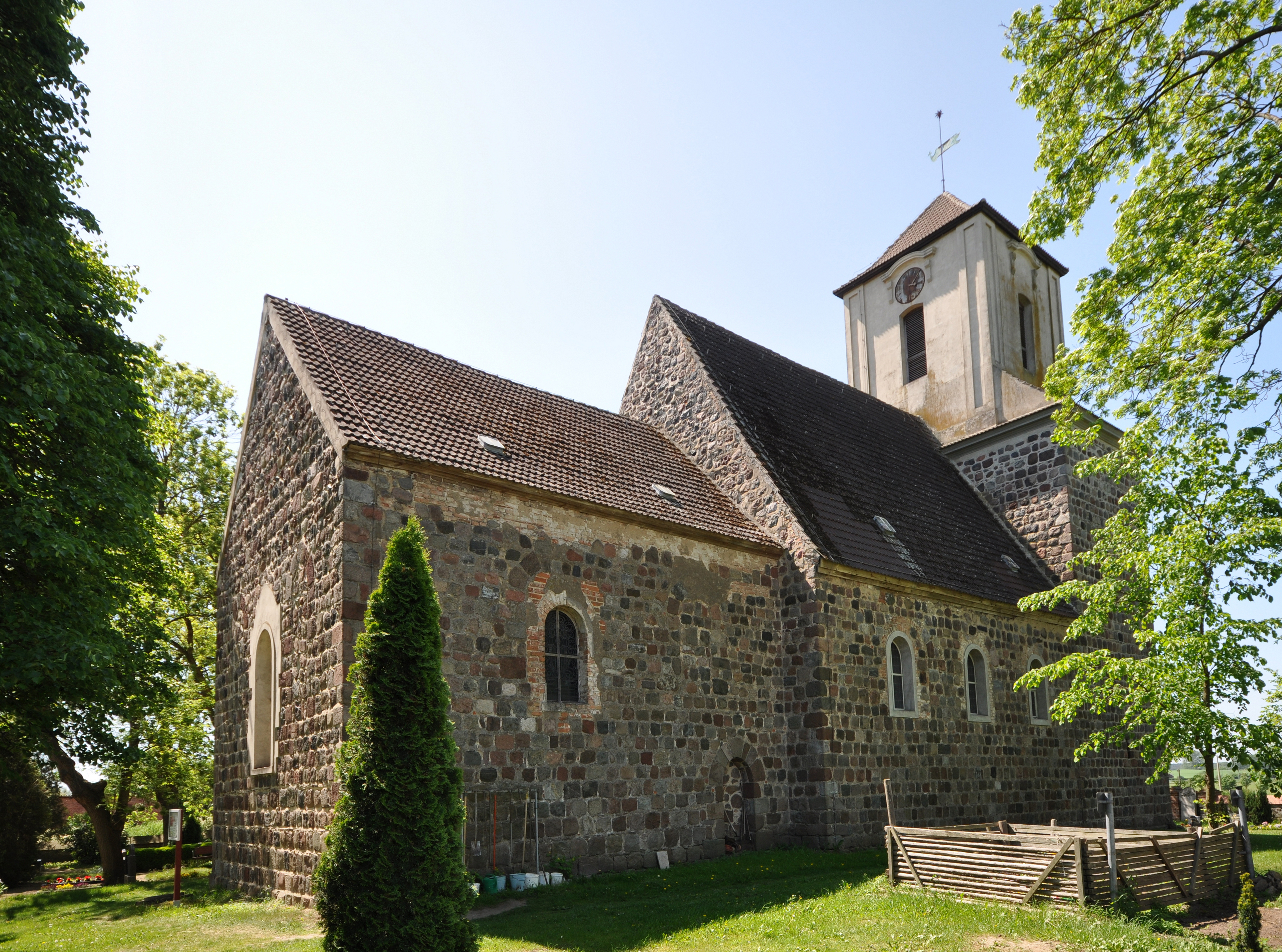 village church in Kerkow